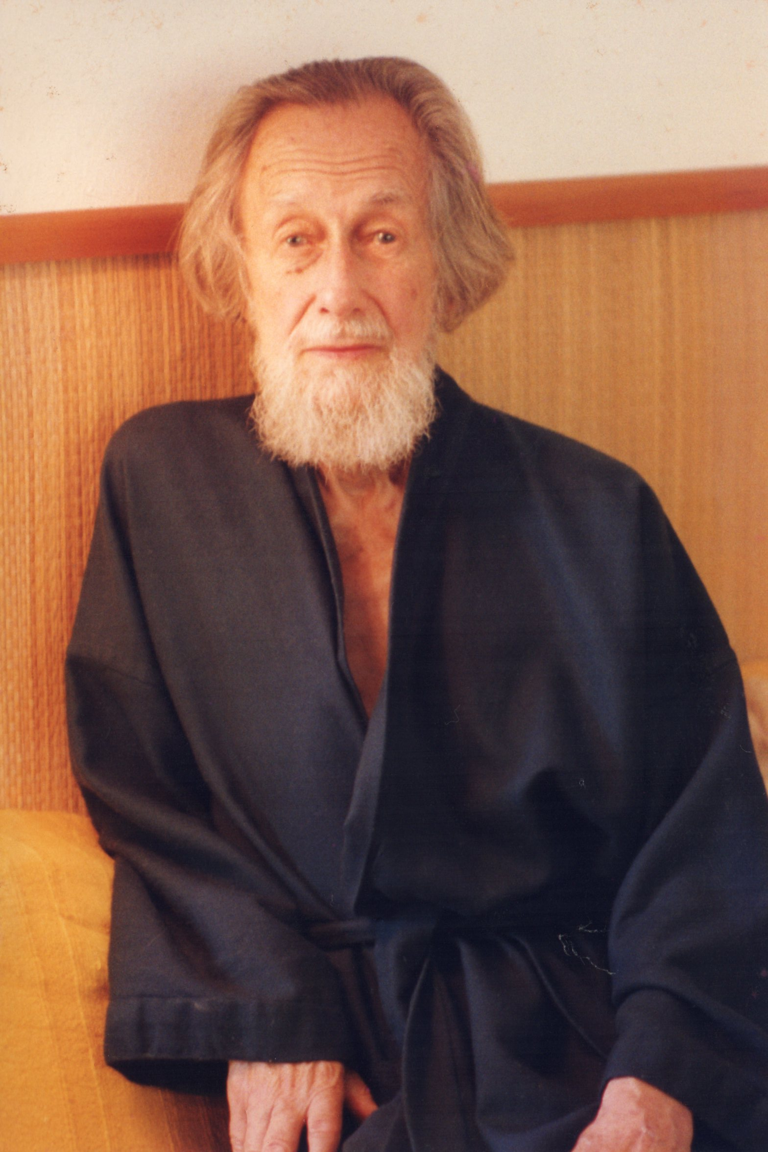 Martin Lings at his house in Westerham, near London, England